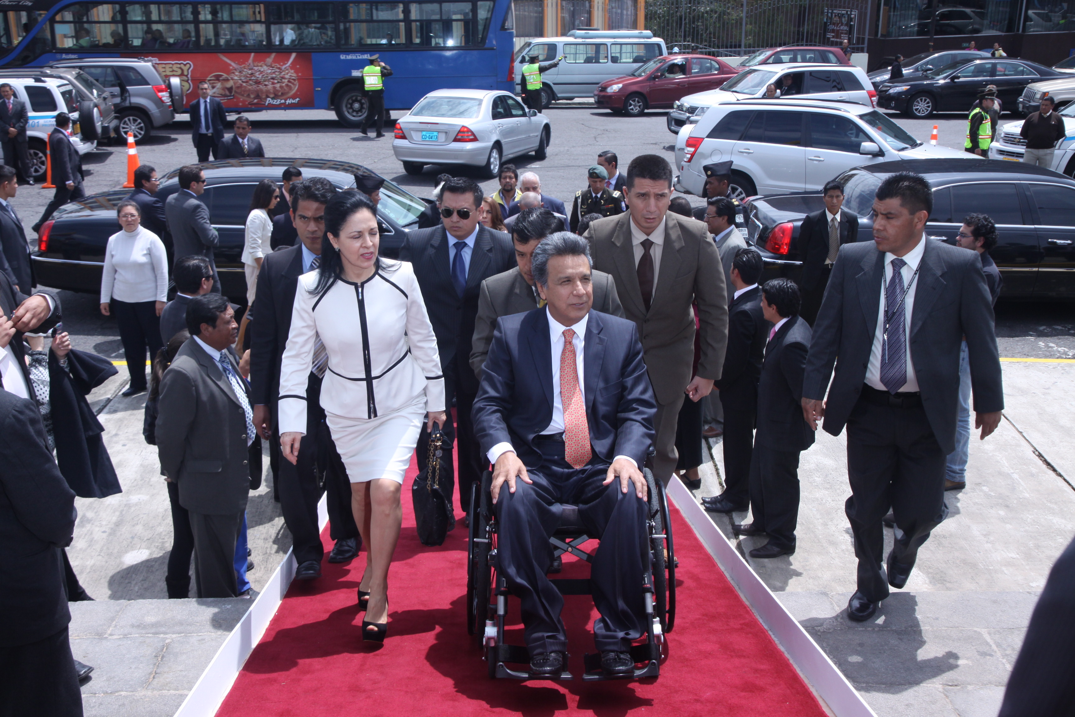 Foto: Hugo Ortiz Ron / Asamblea Nacional